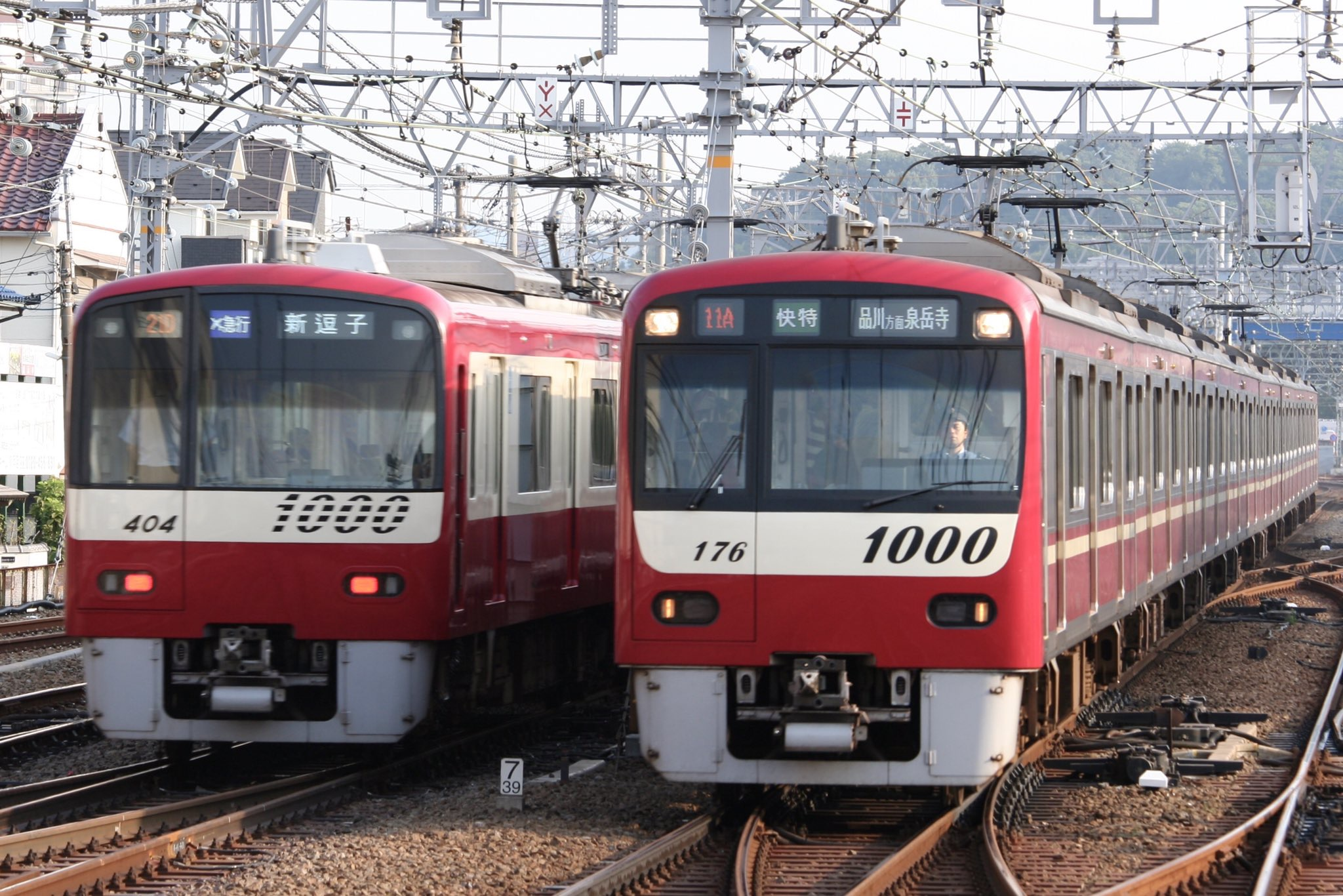 京急新1000形アルミ(1401-)とステンレス(1169-)の並び 京急本線 金沢文庫駅